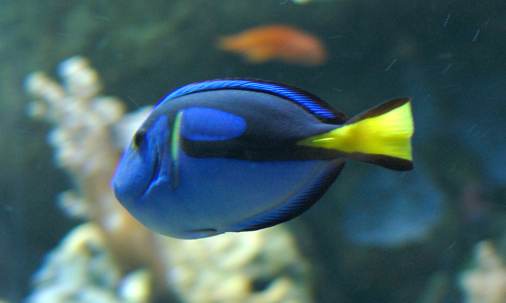 Mi amiguito submarino.